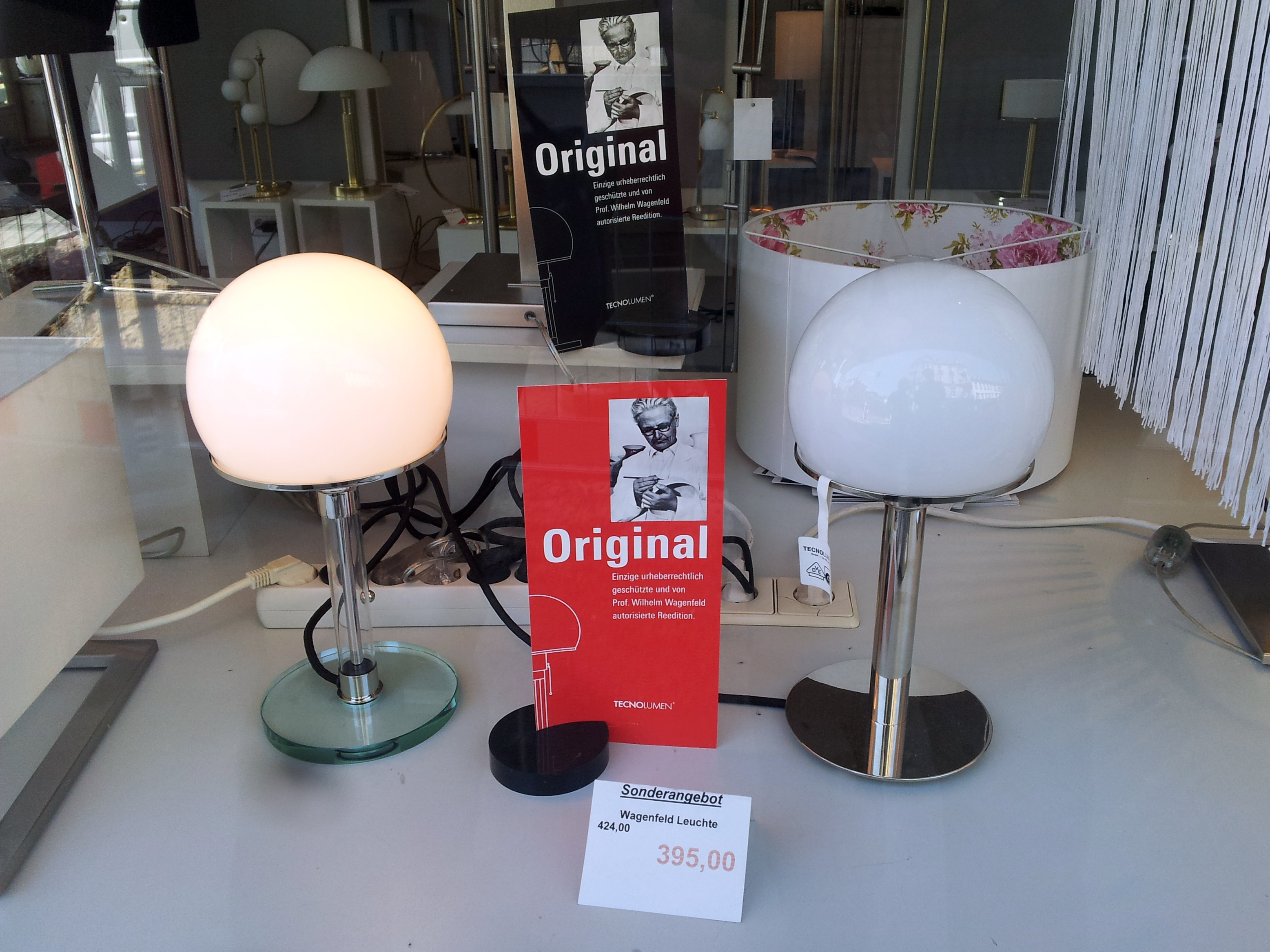 Die zwei lizensierten Reedition-Varianten der sog "Wagenfeld-Leuchte"